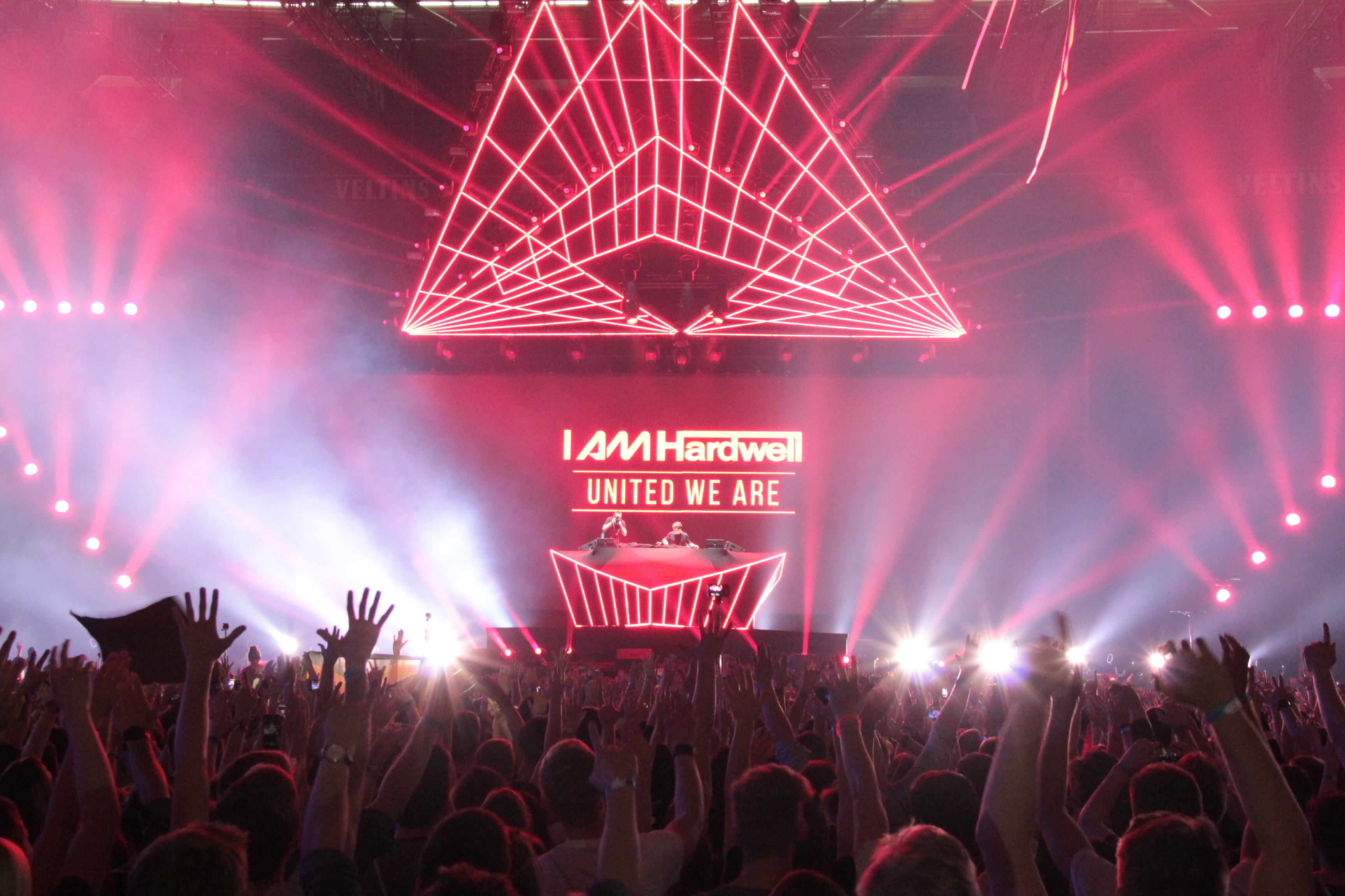 Hardwell2016